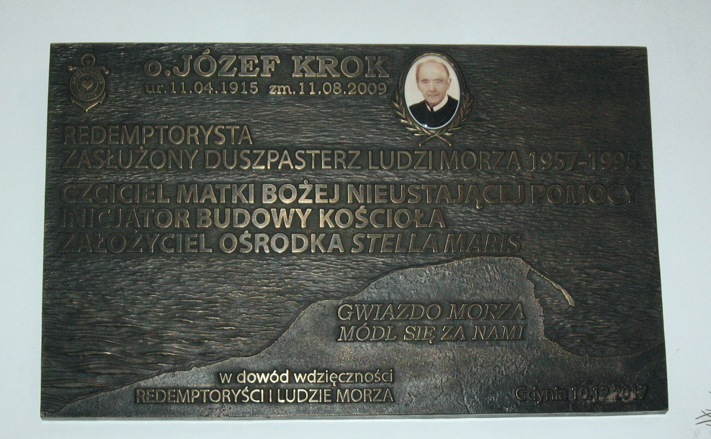 W 2017r. 60 rocznicę odsłonięto tablicę w kościele Parafii p.w. Matki Bożej Nieustającej Pomocy i Św Piotra Rybaka w Gdyni. Tablica upamiętniającą kapelana Józefa Kroka i organizatora placówki Duszpasterstwa Ludzi Morza "Stella Maris" w Gdyni.